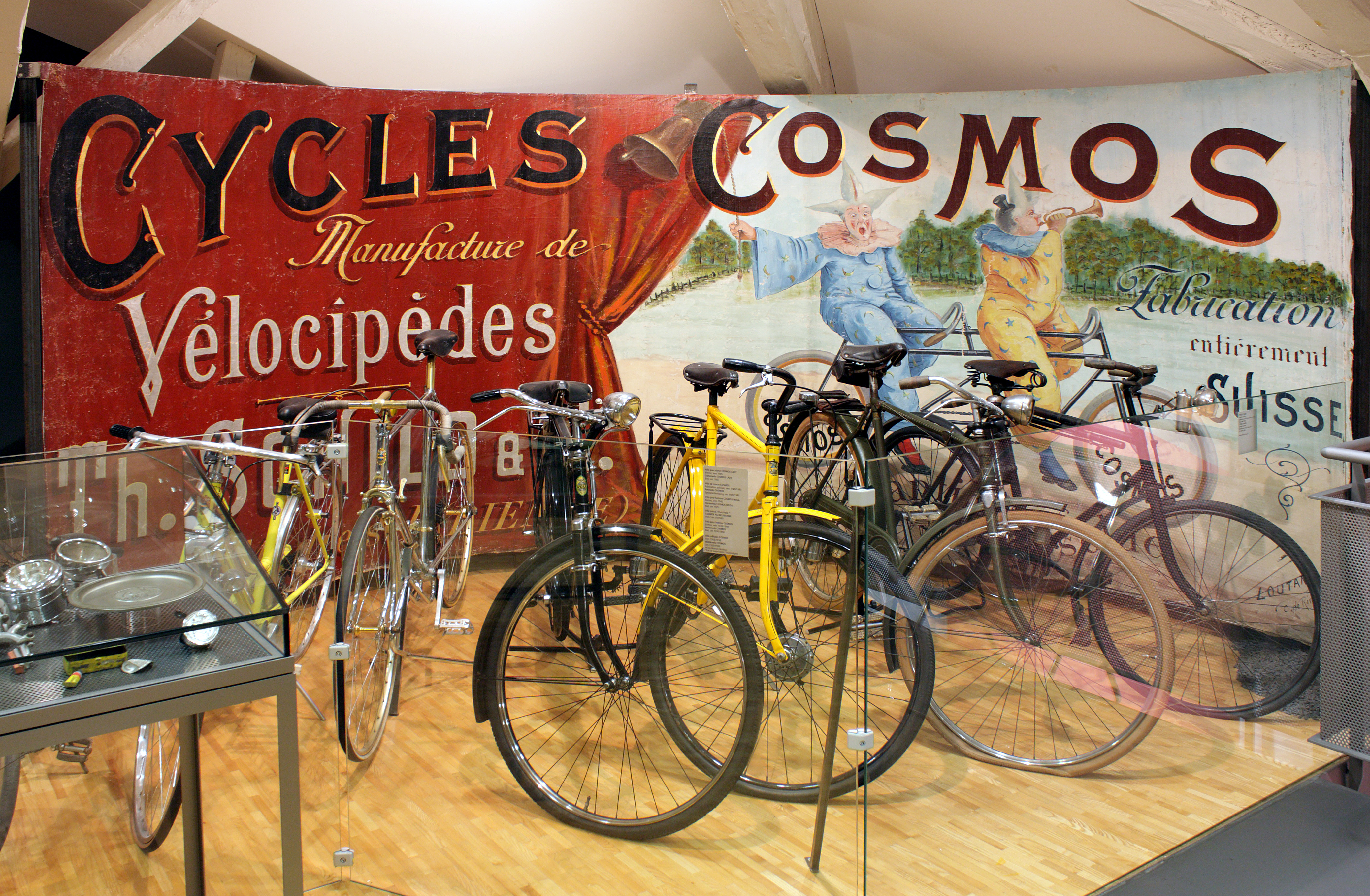 Photographie de l'exposition sur l'histoire industrielle de Bienne au NMB Nouveau Musée Bienne. Photo: Patrick Weyeneth